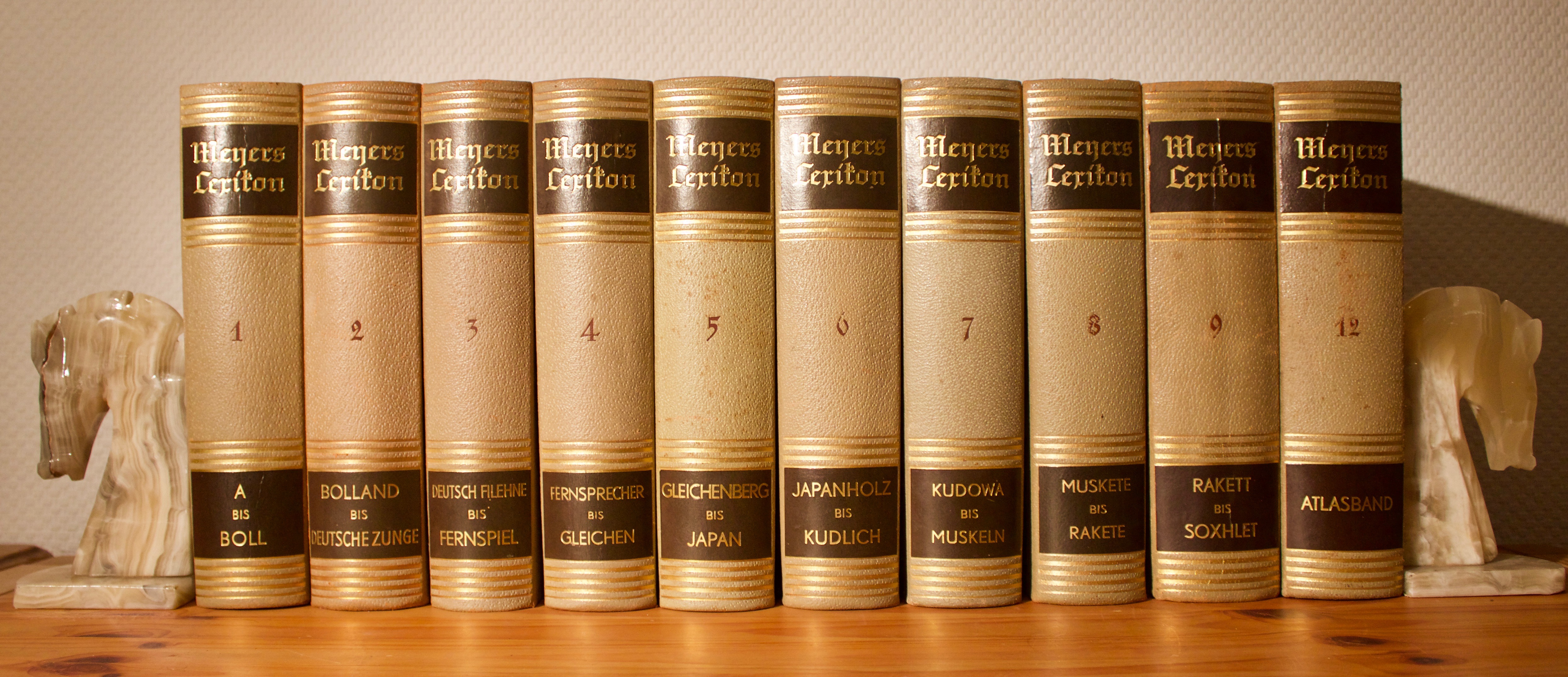 Meyers Konversations-Lexikon Prachtausgabe (1936–1942)